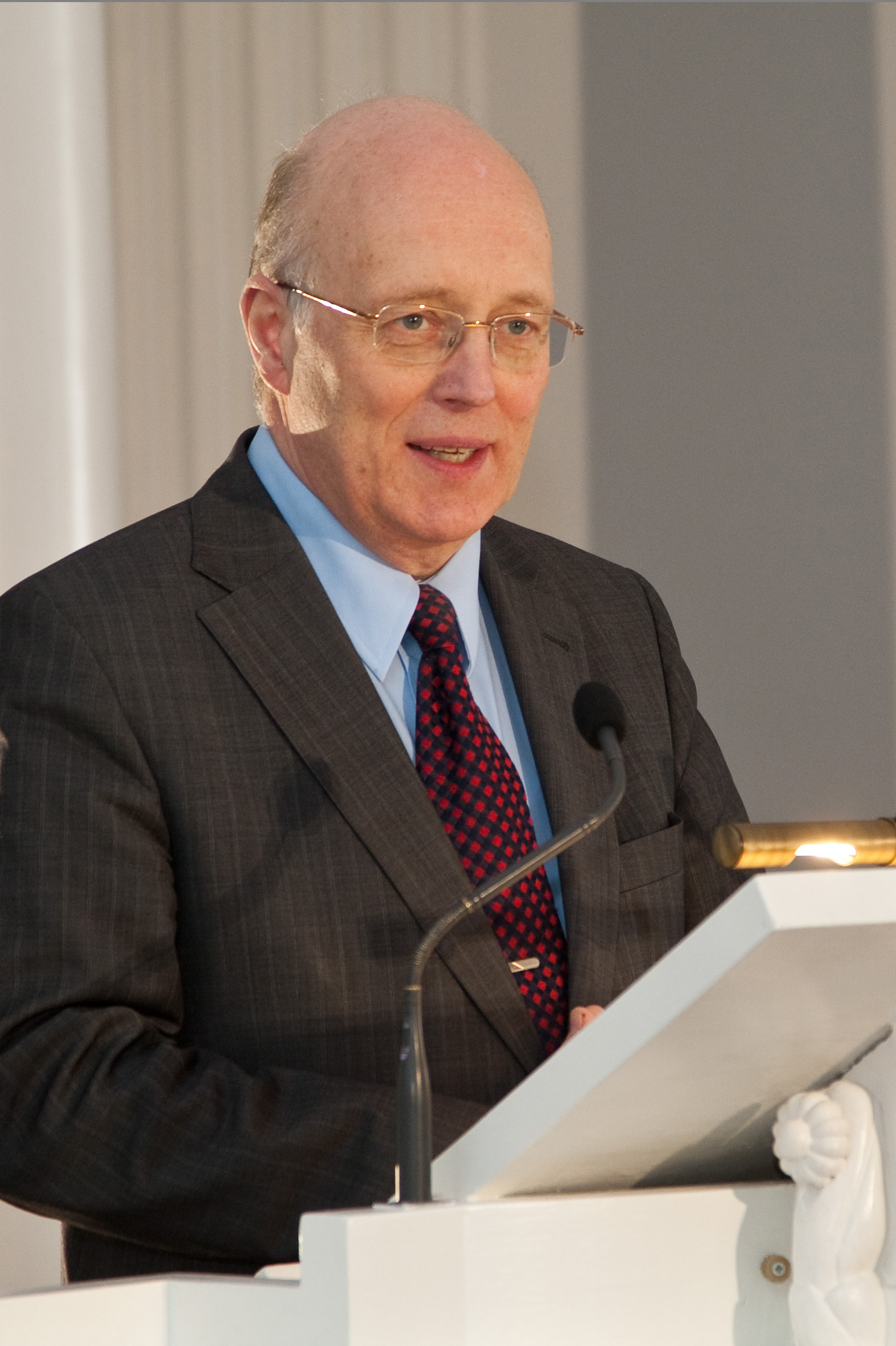 TÜ teadusprorektor Kristajan Haller kõnelemas 2010. aastal Tartu Ülikooli peahoone aulas.